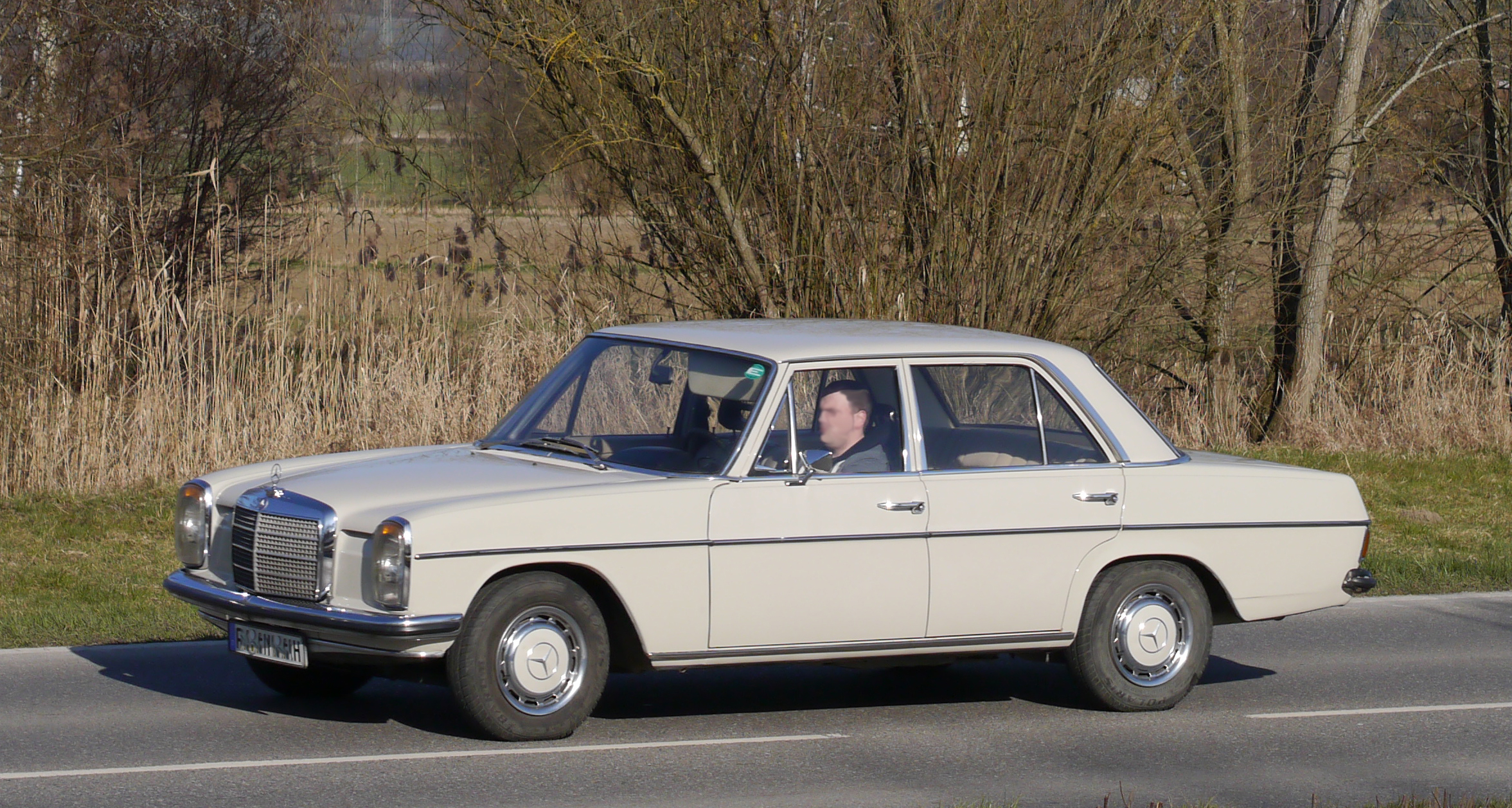 Mercedes Benz W115